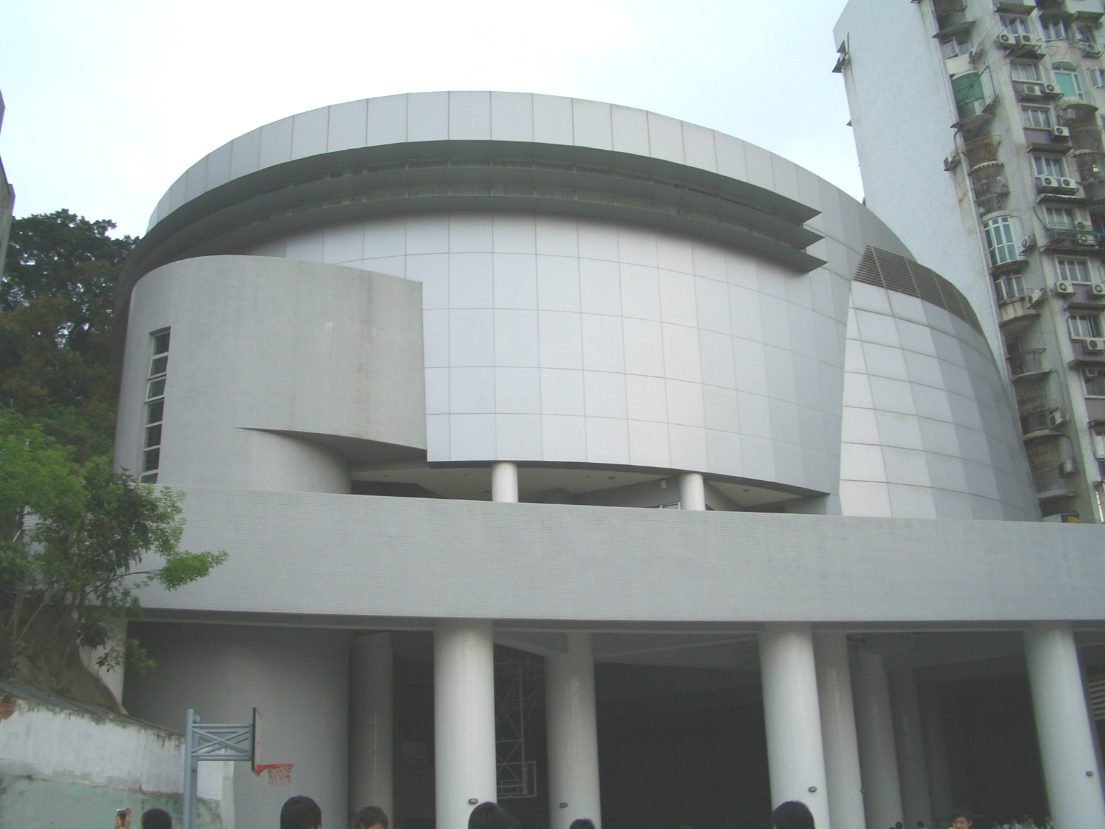 千禧綜合館。